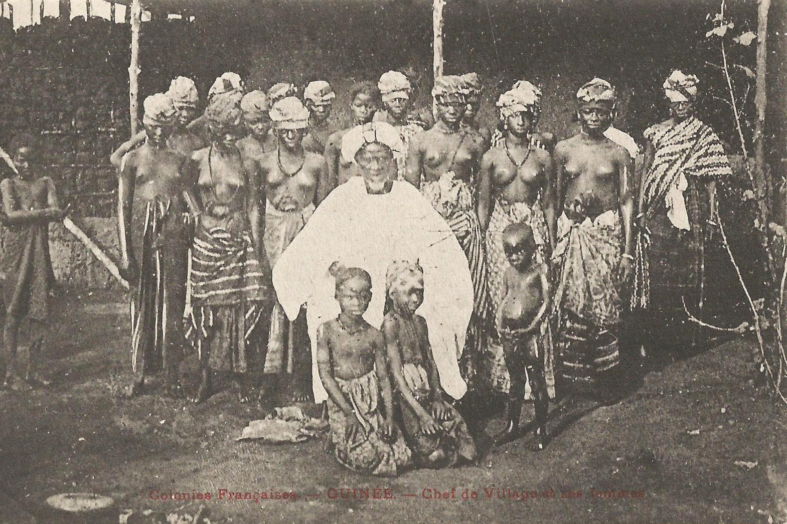 Chef de village et ses femmes. pas de mention d'auteur, d'éditeur ou de date Colonies françaises. Guinée.